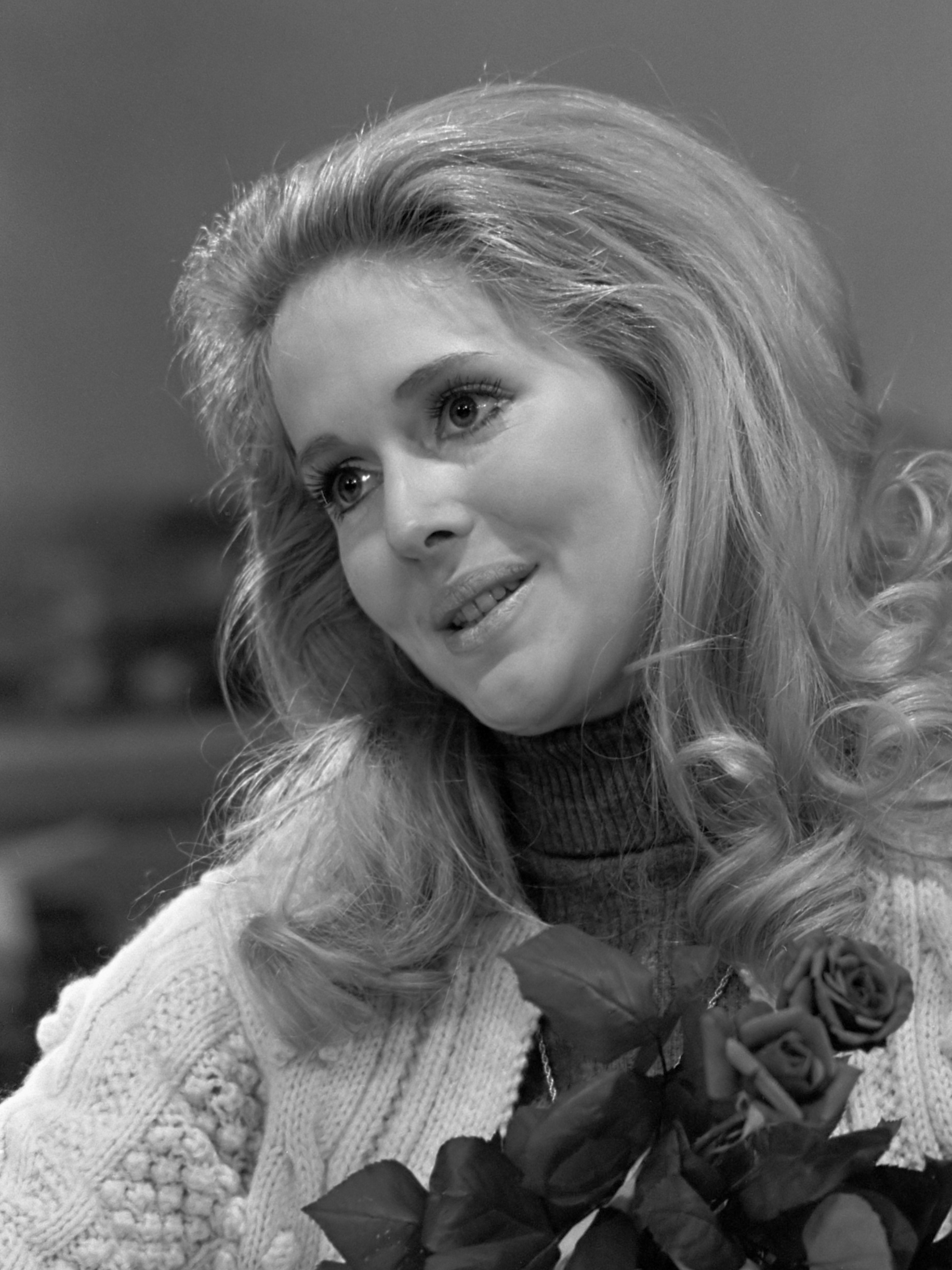 Linda Marshall, TV-ster USA, arriveert op Schiphol.